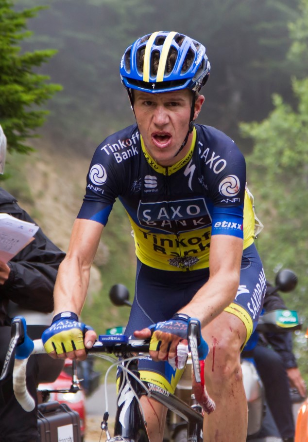 053 chris anker sorensen